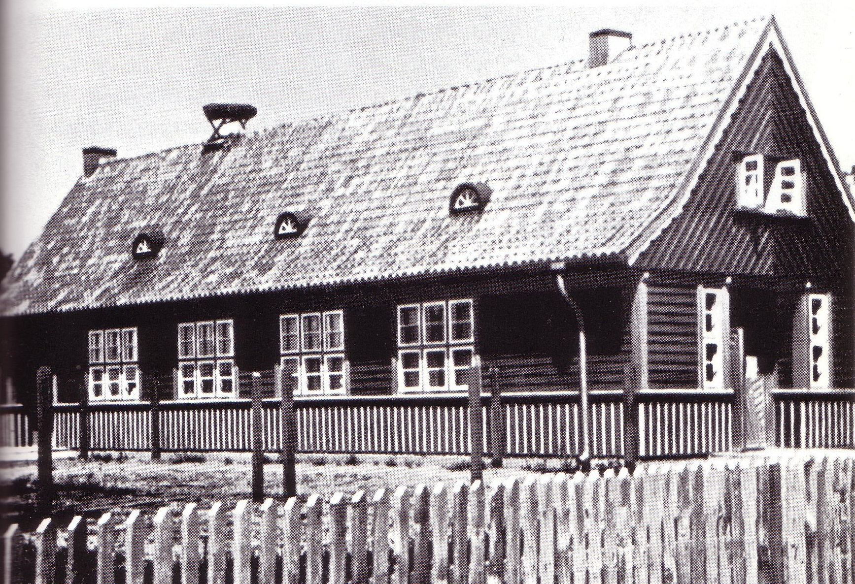 Fotografie vom Haus der Vogelwarte Rossitten